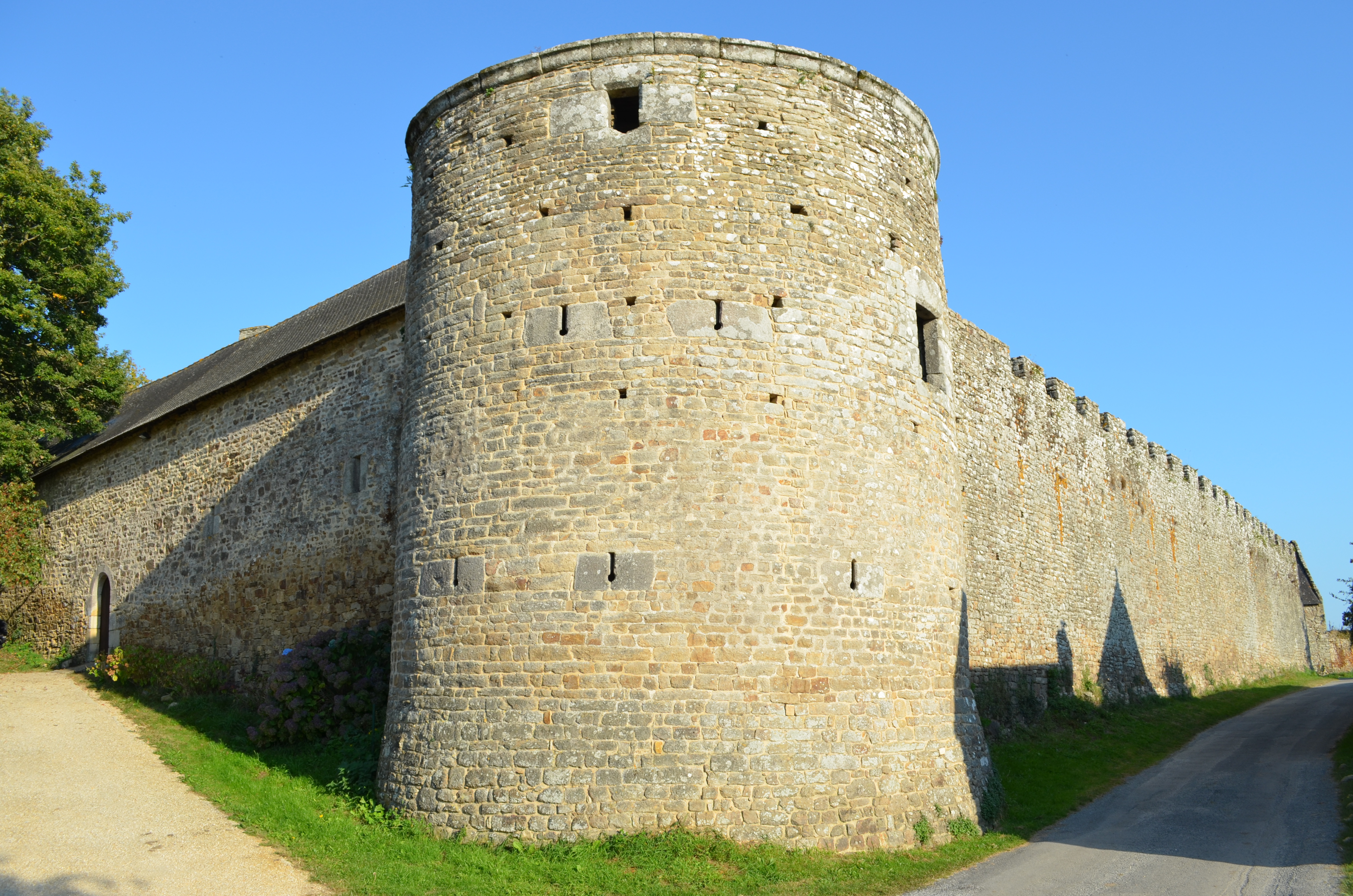 Château du Plessis-Josso (16e s. - 18e s.) - Theix This building is en partie classé, en partie inscrit au titre des Monuments Historiques. .